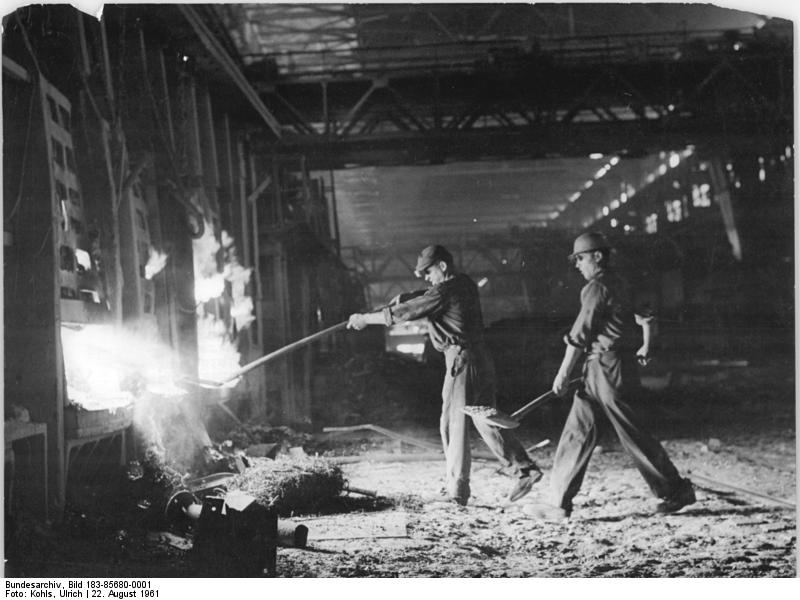 Zentralbild-Kohls Ks-Qu 22.8.1961 Brandenburger Stahlwerker stärken die DDR Auch im Stahl- und Walzwerk Brandenburg haben die Maßnahmen unserer Regierung zum Schutz der DDR eine breite Zustimmungsbewegung ausgelöst. Die Kollegen des Betriebes verpflichten sich, alle Anstrengungen zu unternehmen, die Produktion zu stärken. Einige Kollektive der Schwerpunktabteilungen des Werkes, wie die Brigaden "Peter Götzel" von der Blockwalzstrasse, "Ernst Thälmann" von der Drahtstrasse und die Kollegen des Siemens-Martin-Ofen I haben beispielhafte Produktionsverpflichtungen abgegeben. UBz. Durch vorbildliche Arbeit konnte das Kollektiv des Ofen I in diesem Monat 800 t Rohstahl über den Plan produzieren.- Die Schmelzer Erhard Fege und Werner Deffge (links) bei der Schlackenarbeit am Ofen I."